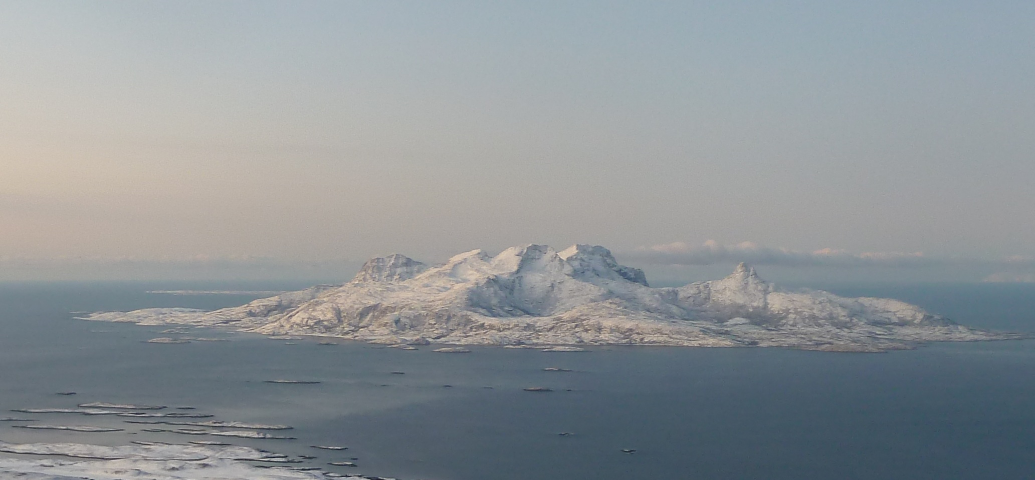 Landegode i desember, 2011.